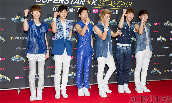 인피니트. 슈퍼스타K 3 하이라이트 시사회 레드카펫 행사장에서